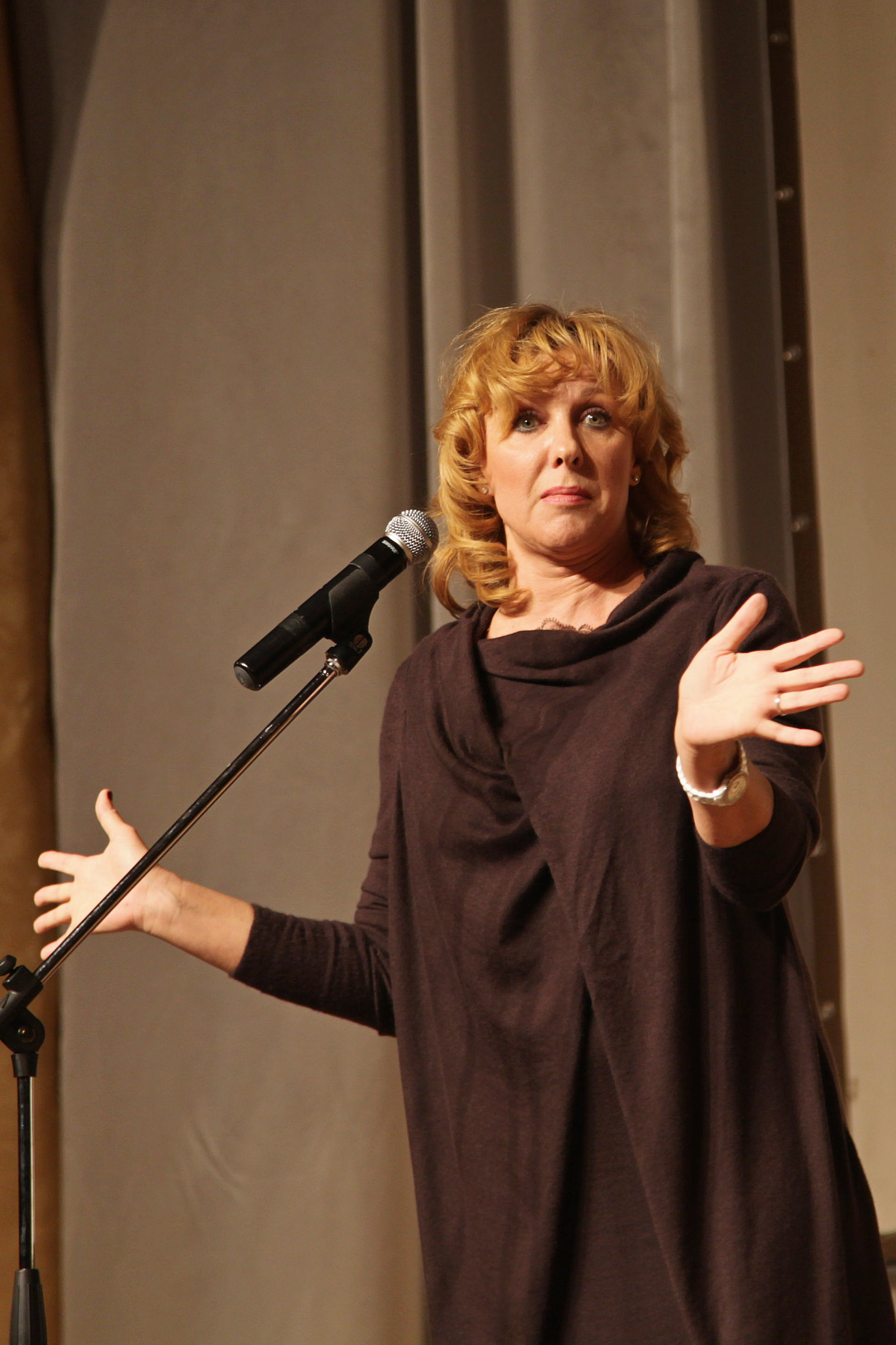 Актриса Елена Яковлева в МАУ «Центр культуры и общественных мероприятий» Северодвинска